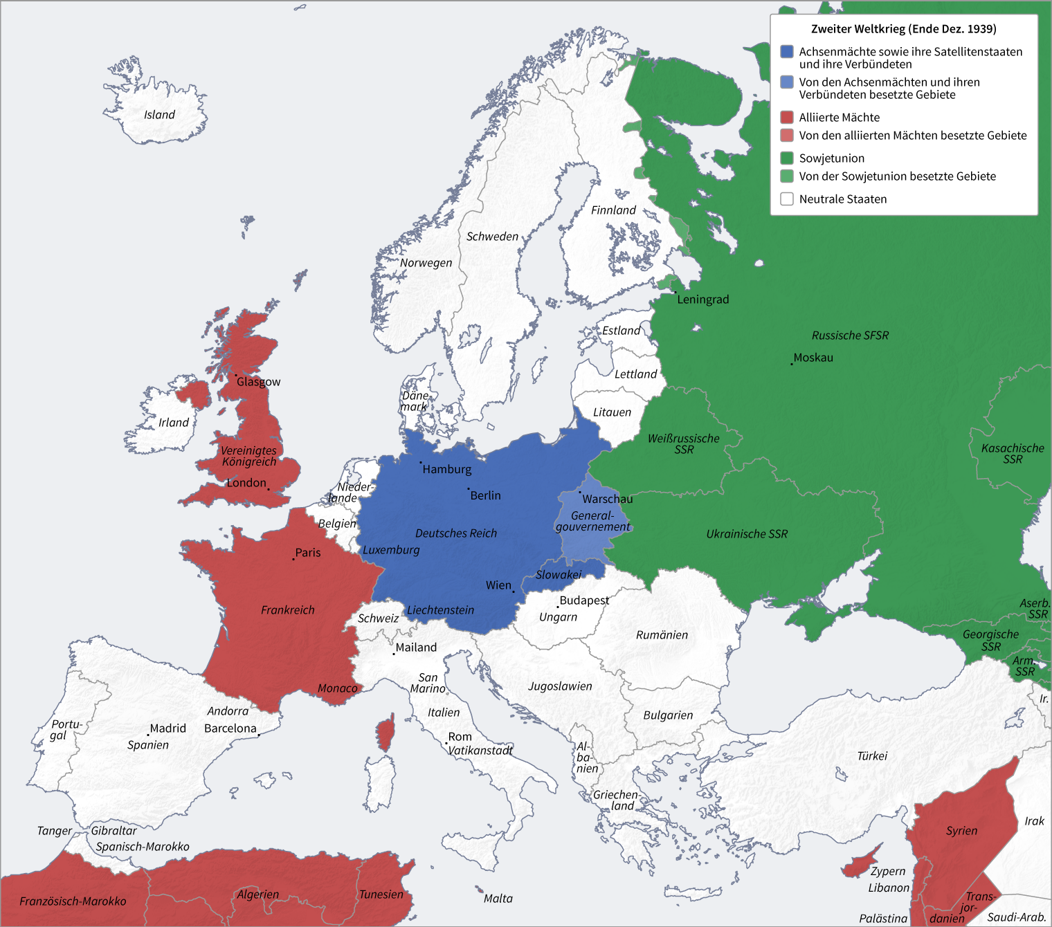 Zweiter Weltkrieg (Ende Dez. 1939)